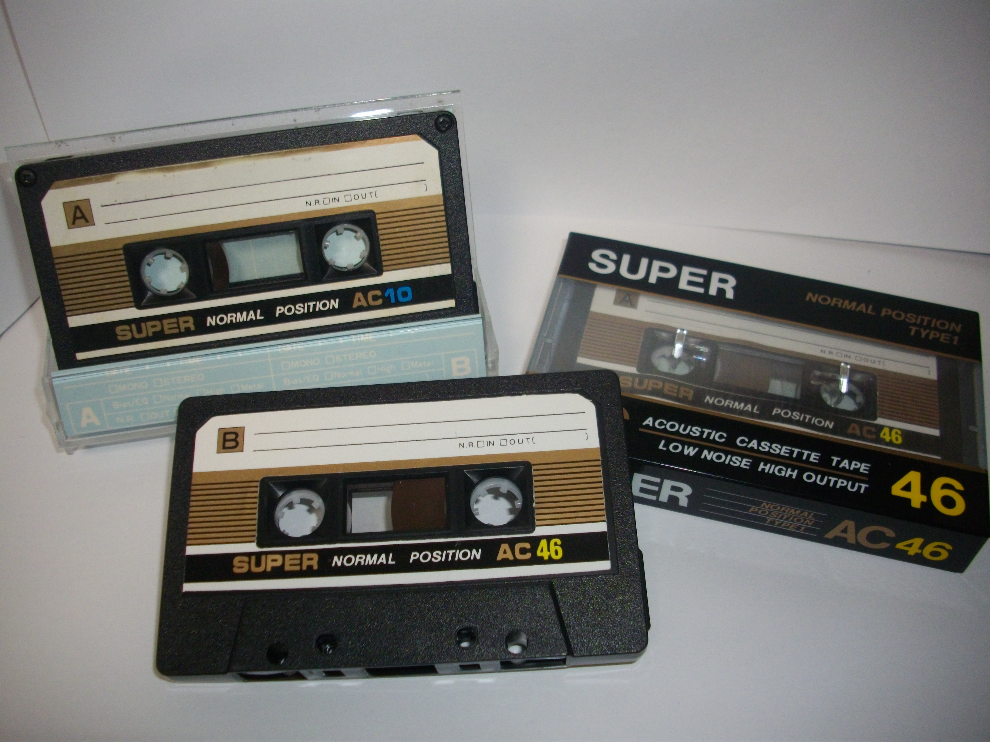 SUPER ACのカセットテープ。